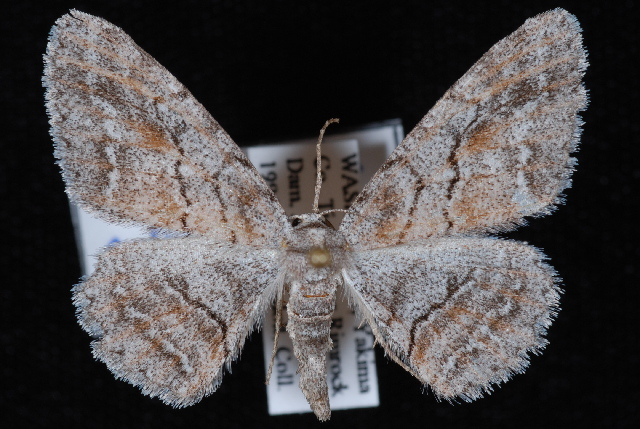 Stenoporpia pulmonaria